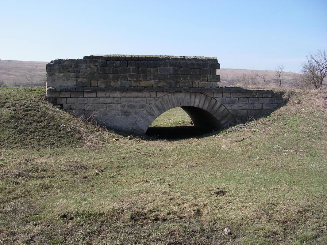 Мост